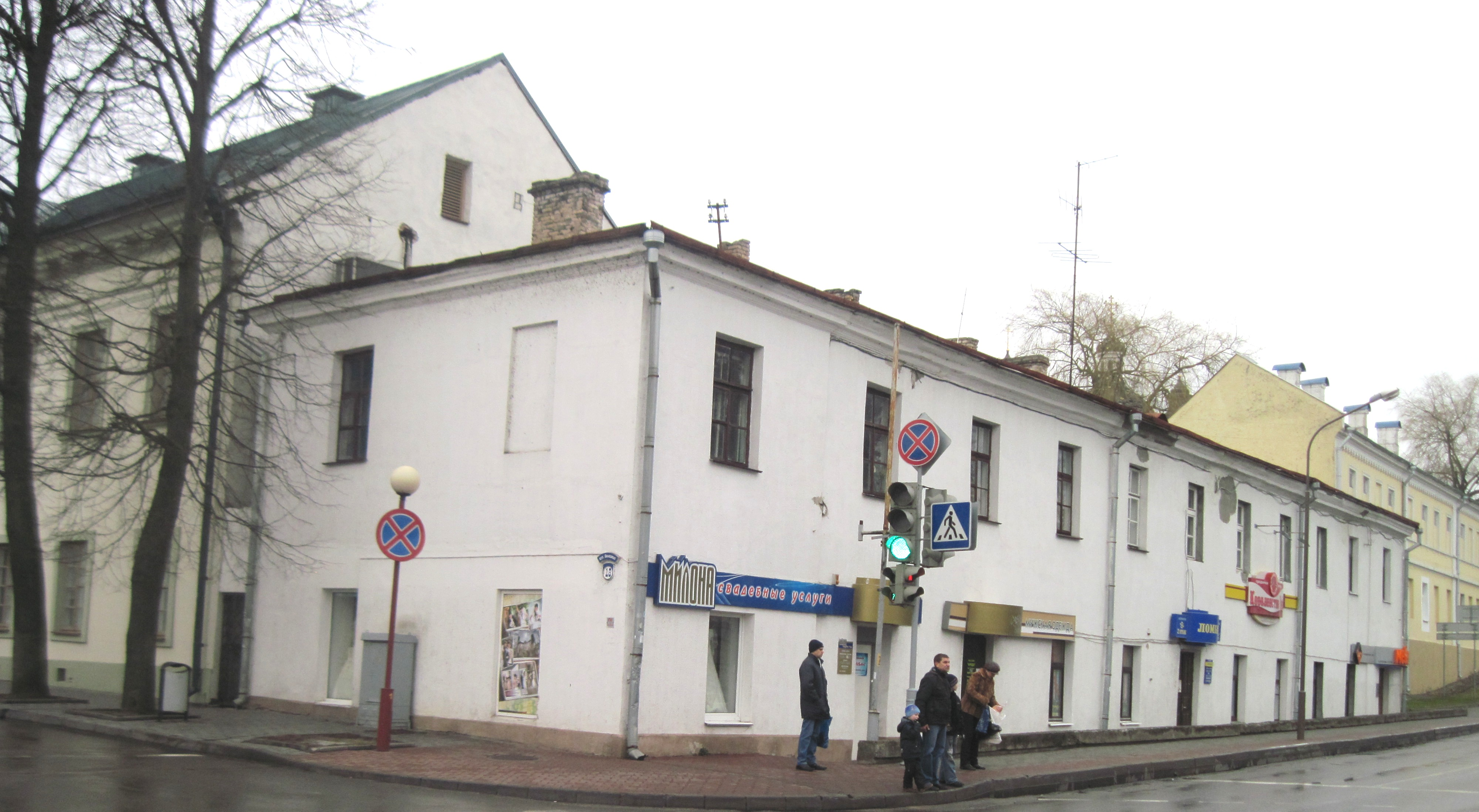 Беларуская (тарашкевіца): Будынак па Замкавай, 18, Гродна